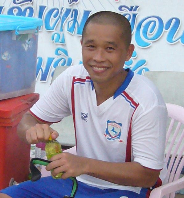 Seksan Piturat